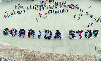 Action organisée à Nîmes par l'Alliance Anticorrida.